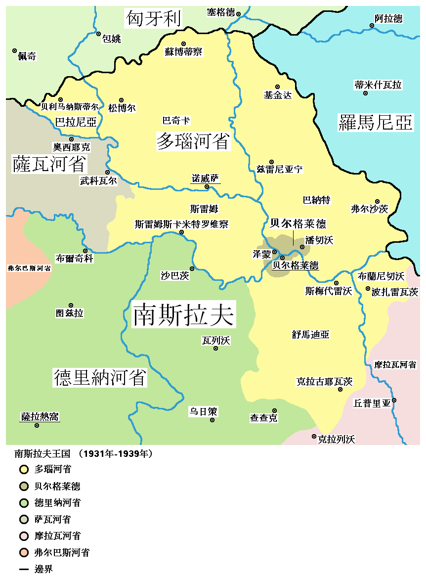 南斯拉夫王國的多瑙河省地圖中譯版。 Image:Danube banovina.png